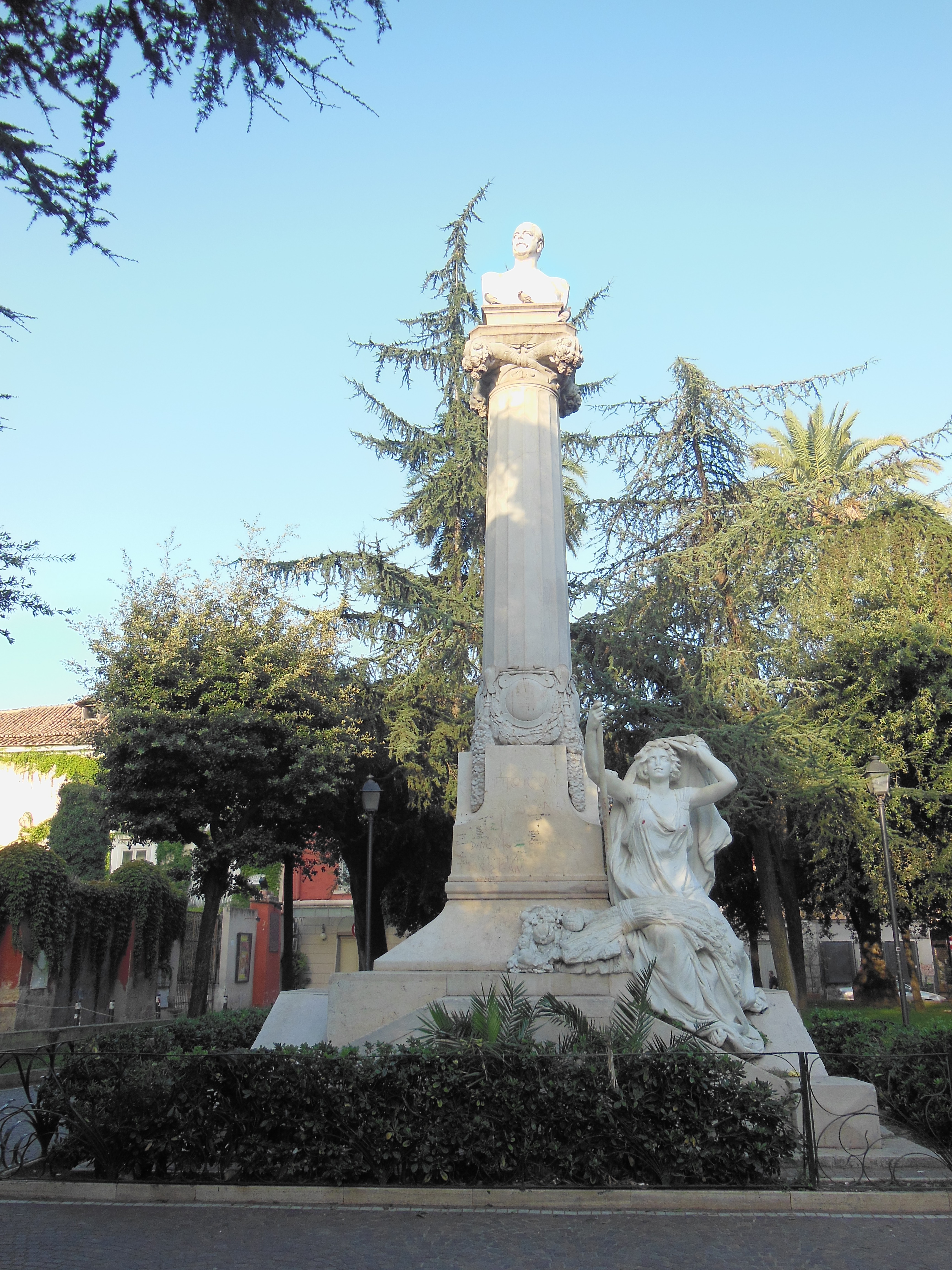 Opera propria